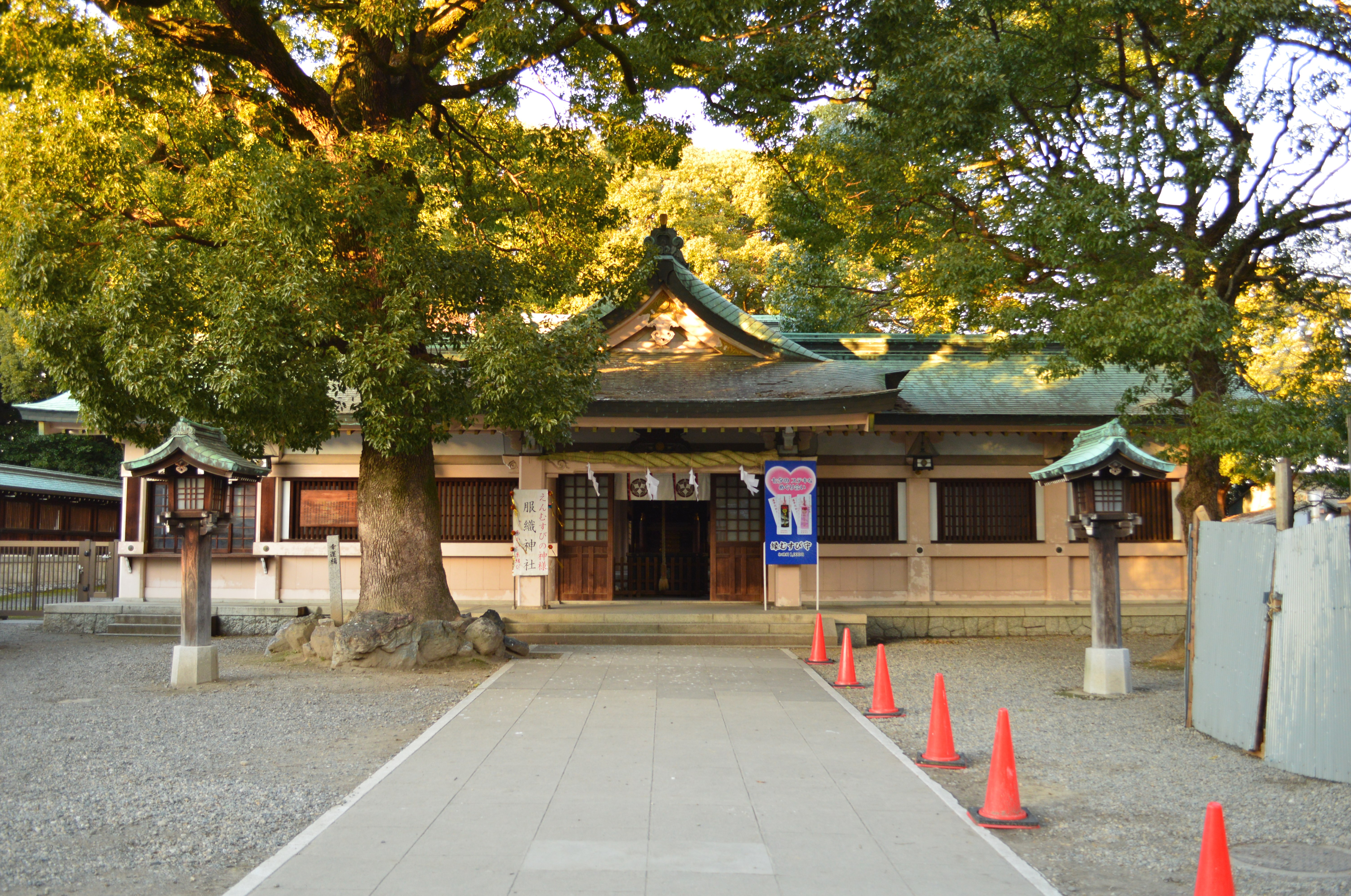 真清田神社 境内服織神社